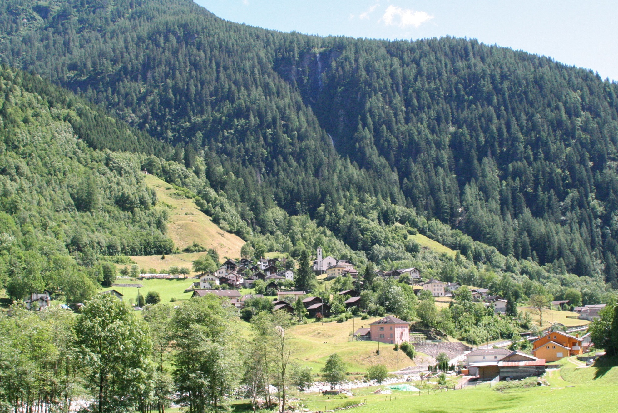 Selma